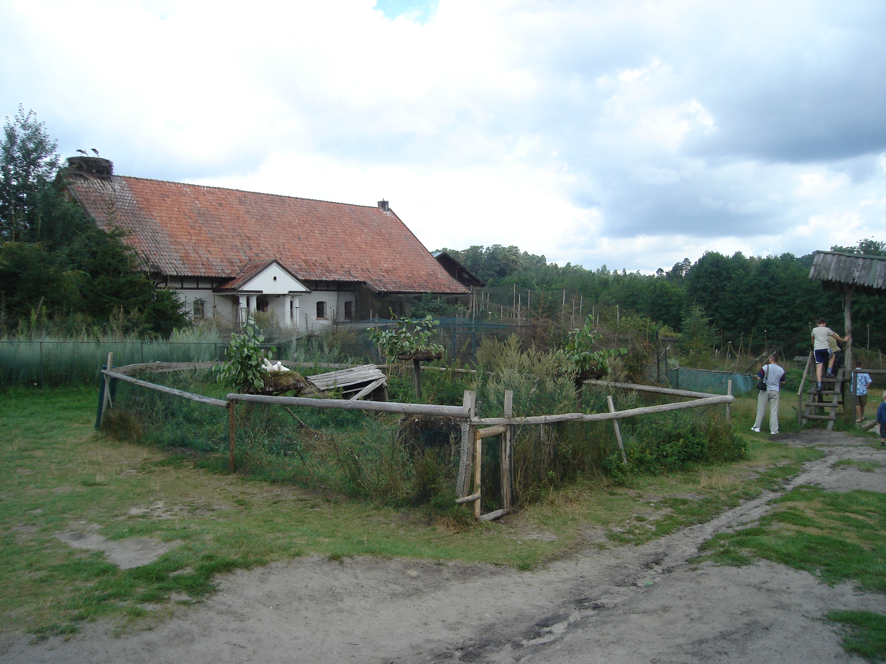 Park Dzikich Zwierząt w Kadzidłowie